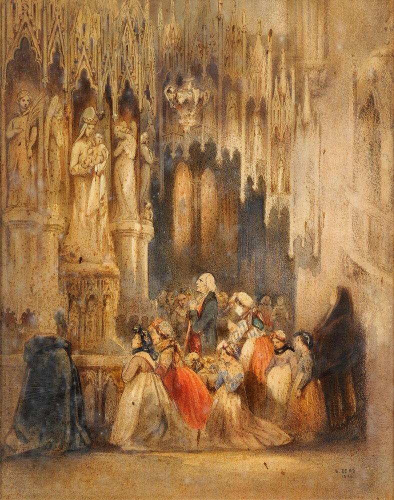 Menschen beten vor einer Madonnenstatue in einer Kirche. Aquarell.